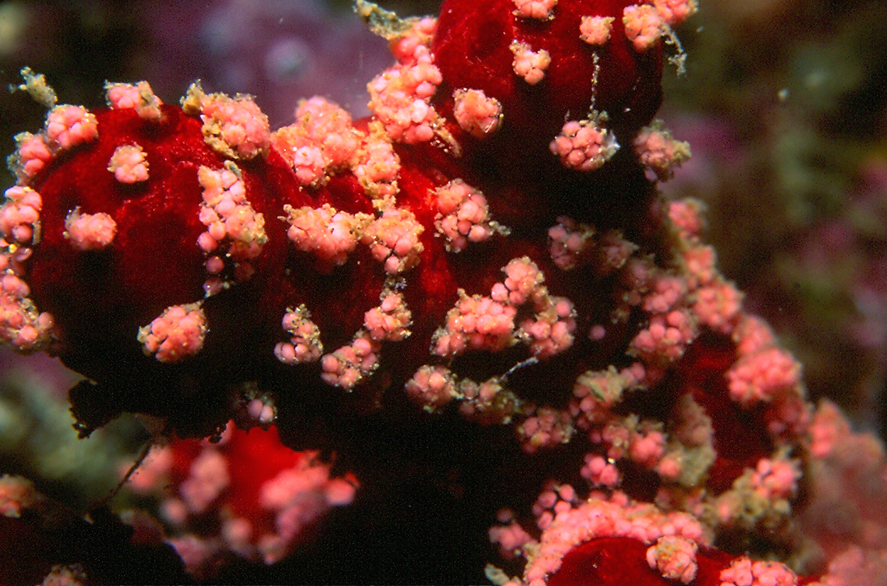 Alcyonium acaule et sa ponte